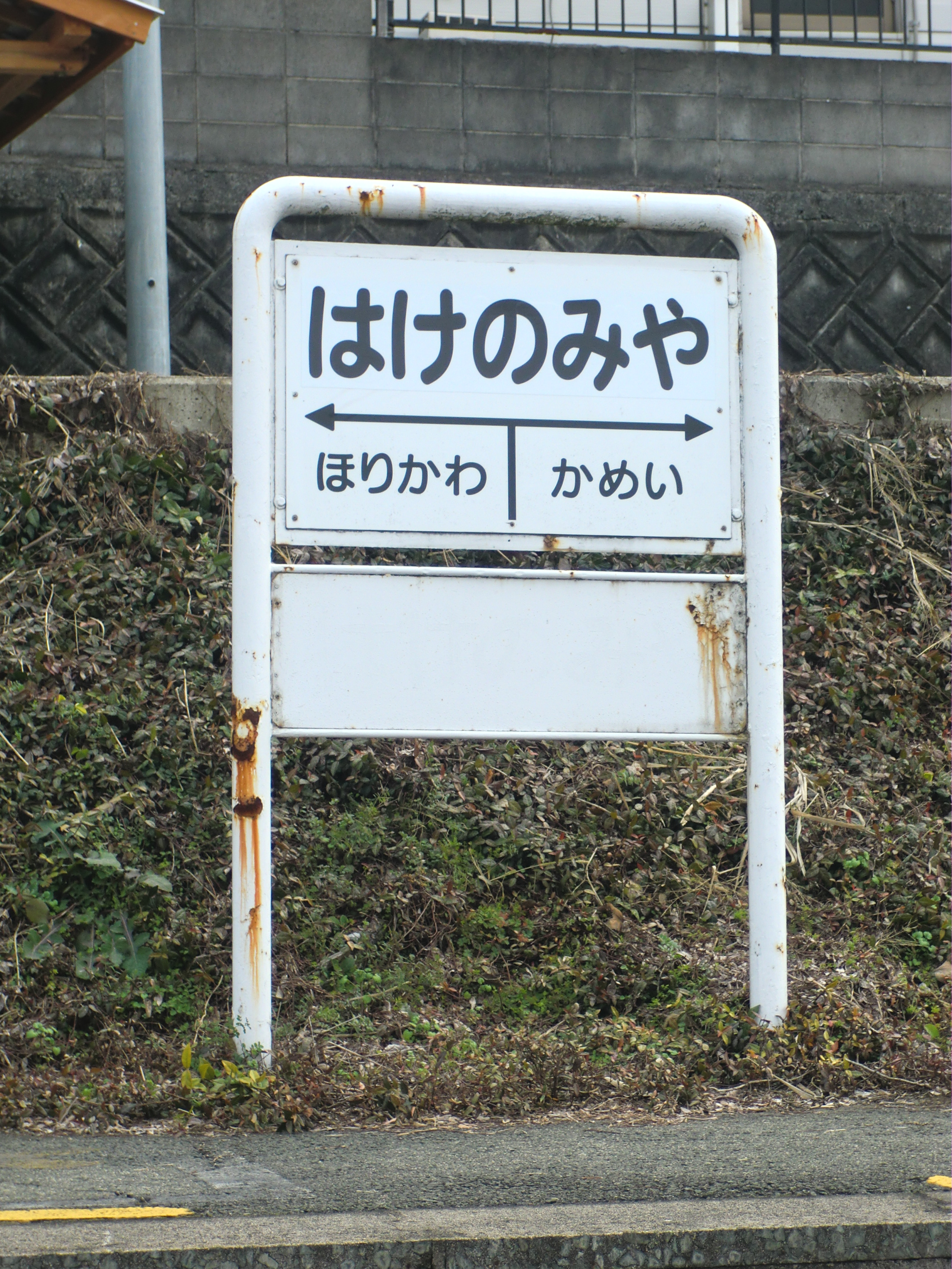 「はけのみや」表示に修正された熊本電鉄八景水谷駅の駅名標